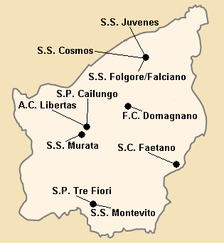 Répartition des clubs en Serie A1 en 1993-1994.